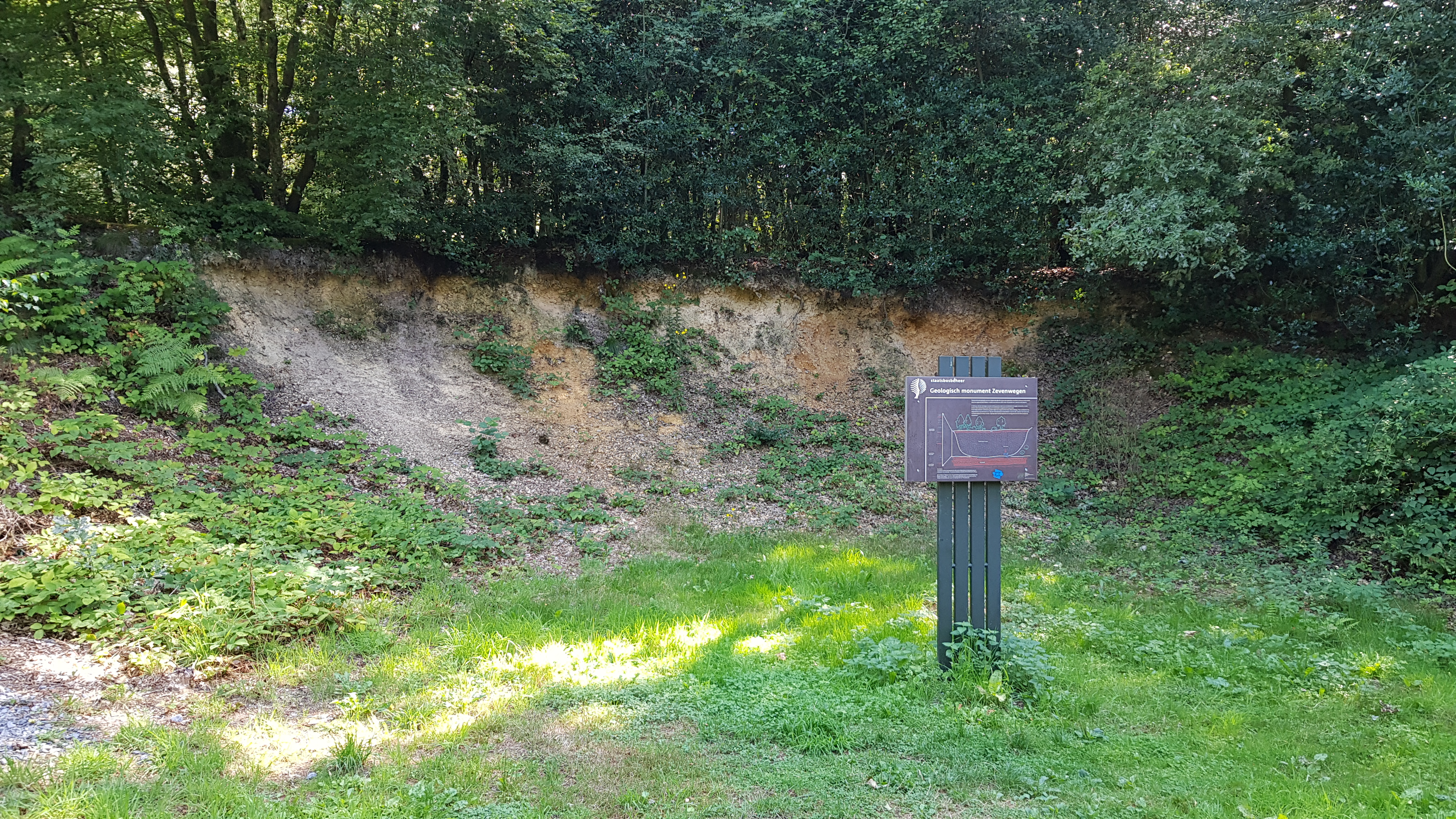 Geologisch monument Zevenwegen, in de Vijlenerbossen, Vaals, Limburg, Nederland